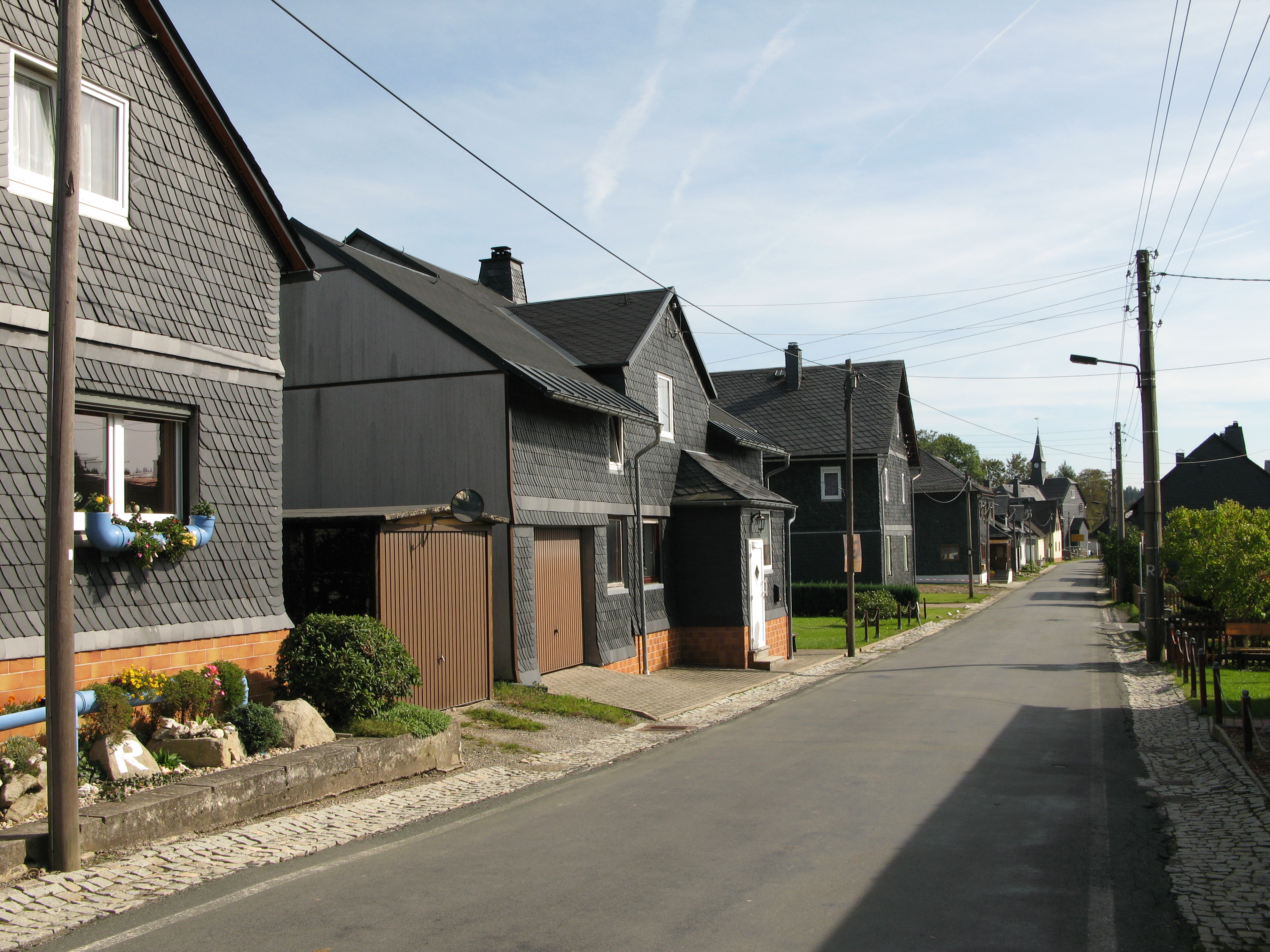 Ortsansicht von Brennersgrün, einem Ortsteil von Lehesten im Thüringer Wald.